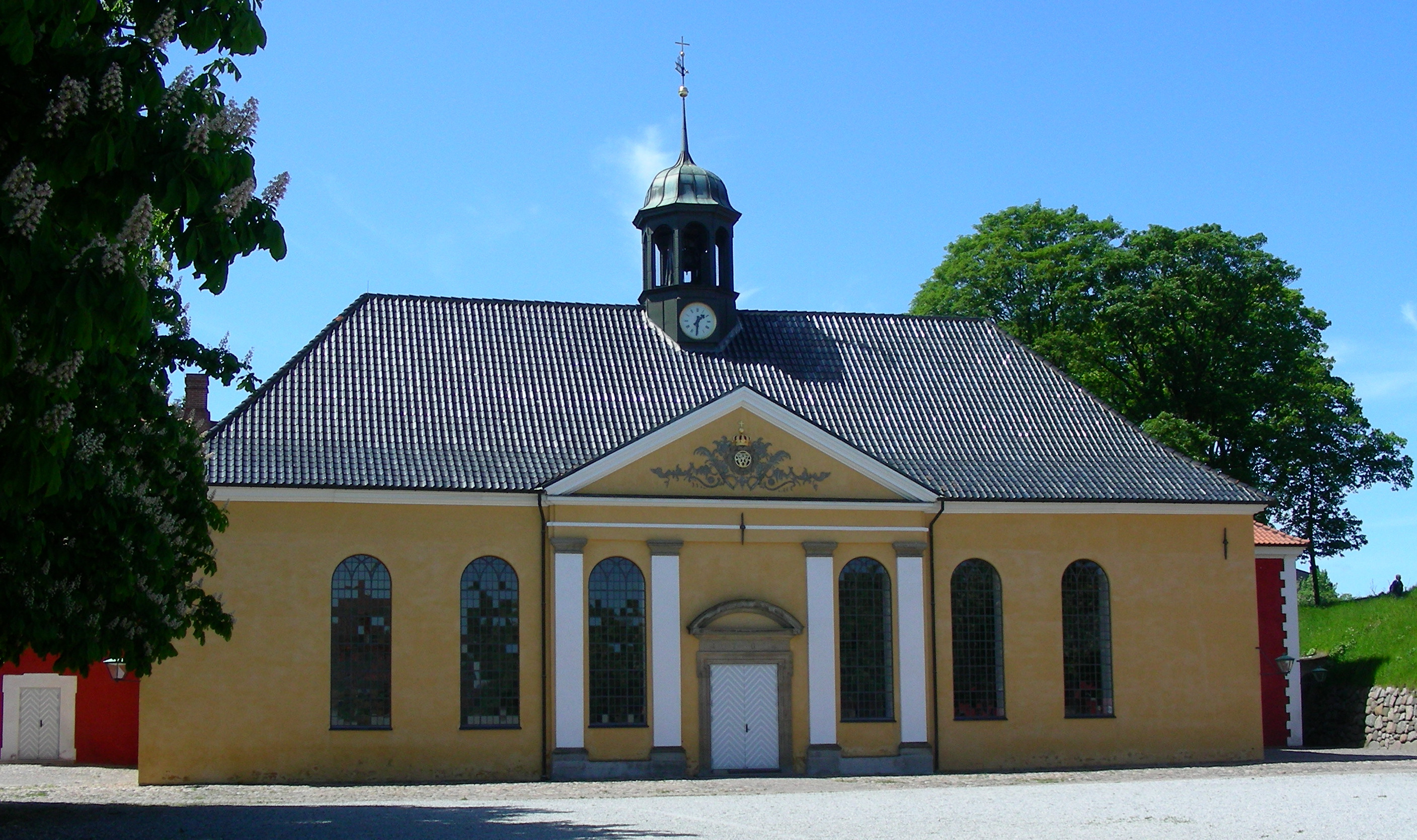 Kastelskirken (Citadel Church), Copenhagen, Denmark.